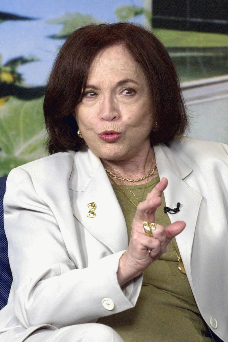 A atriz brasileira Natália Timberg.